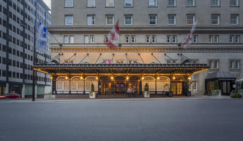 Photo de l'entrée du Ritz-Carlton prise de la rue Sherbrooke